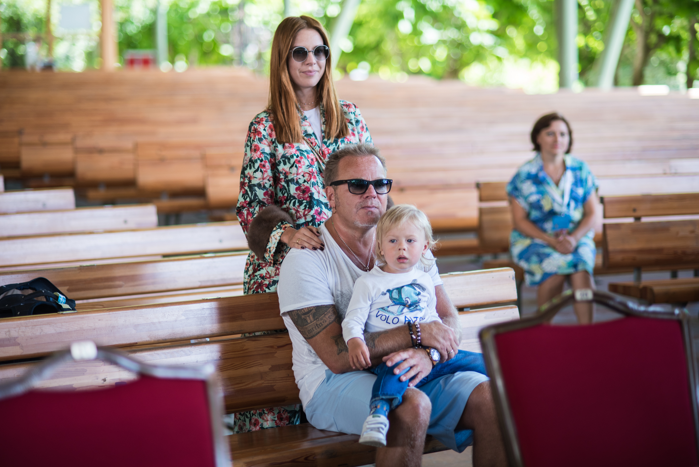 Владимир Пресняков и Наталья Подольская с сыном на фестивале «Лайма. Рандеву. Юрмала 2017»